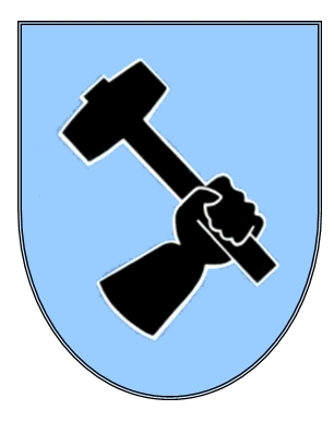 Geschwaderwappen des Kampfgeschwader 2